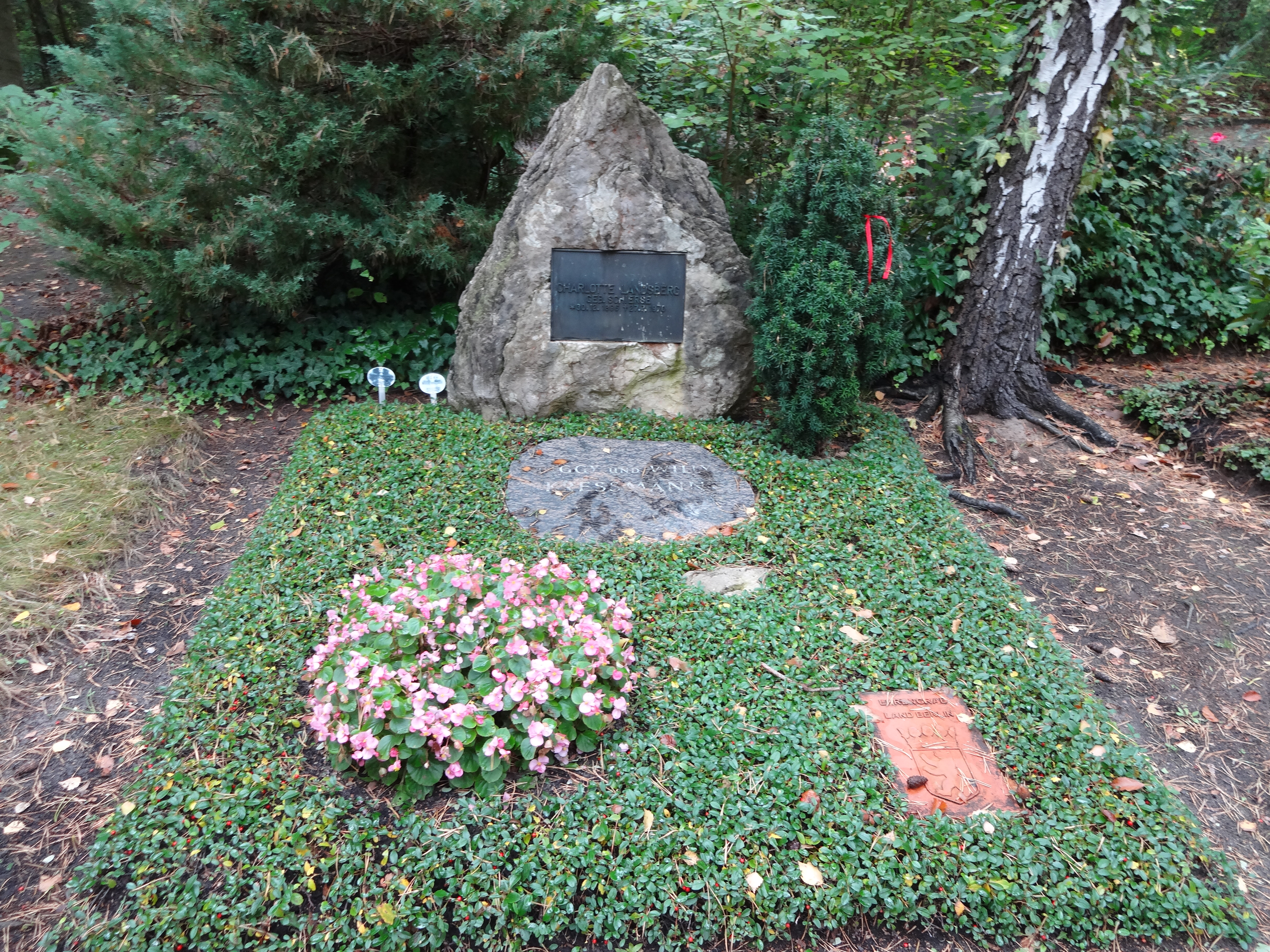 Grab von Willy Kressmann auf dem Waldfriedhof Zehlendorf; Ehrengrab